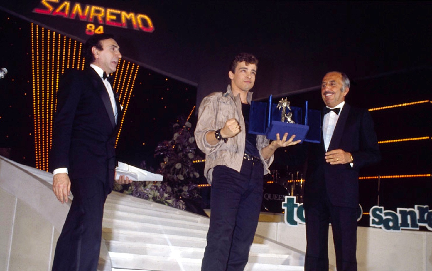 Sanremo, Teatro Ariston, 2-4 febbraio 1984. Il cantante italiano Eros Ramazzotti (al centro) viene premiato come vincitore della sezione Nuove Proposte al Festival di Sanremo 1984, con il brano Terra promessa, sotto lo sguardo del presentattore dell'edizione Pippo Baudo (a sinistra). Licensing 1984 02 1984 02 1984 02